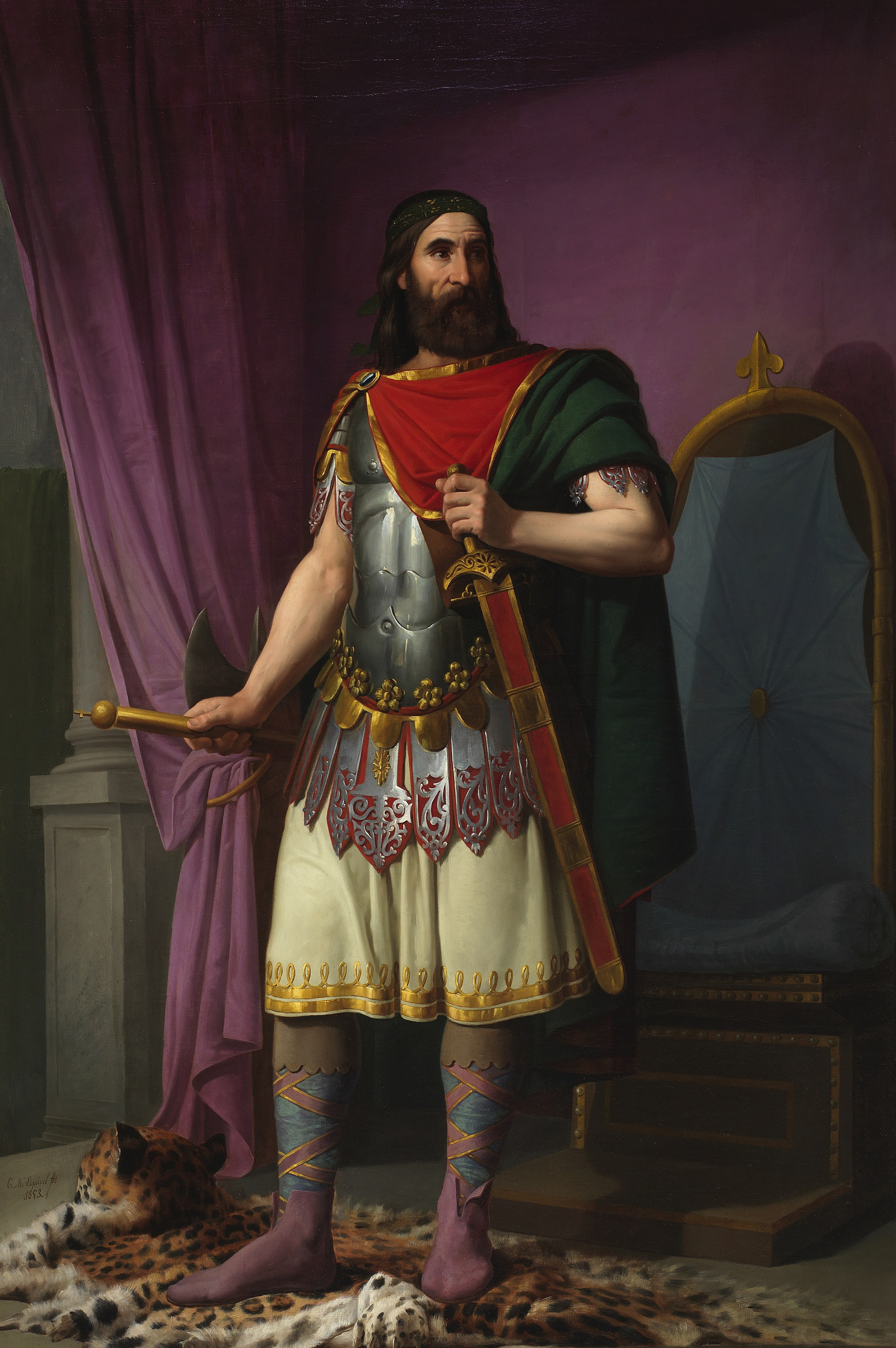 El lienzo representa a Égica († 702/703), rey de los visigodos entre los años 680 y 687. Sucedió al rey Ervigio y fue sucedido a su vez por su hijo, el rey Witiza. El rey Égica aparece pisando una piel de leopardo, con el cetro en su mano derecha y descansando la mano izquierda sobre la empuñadura de la espada.